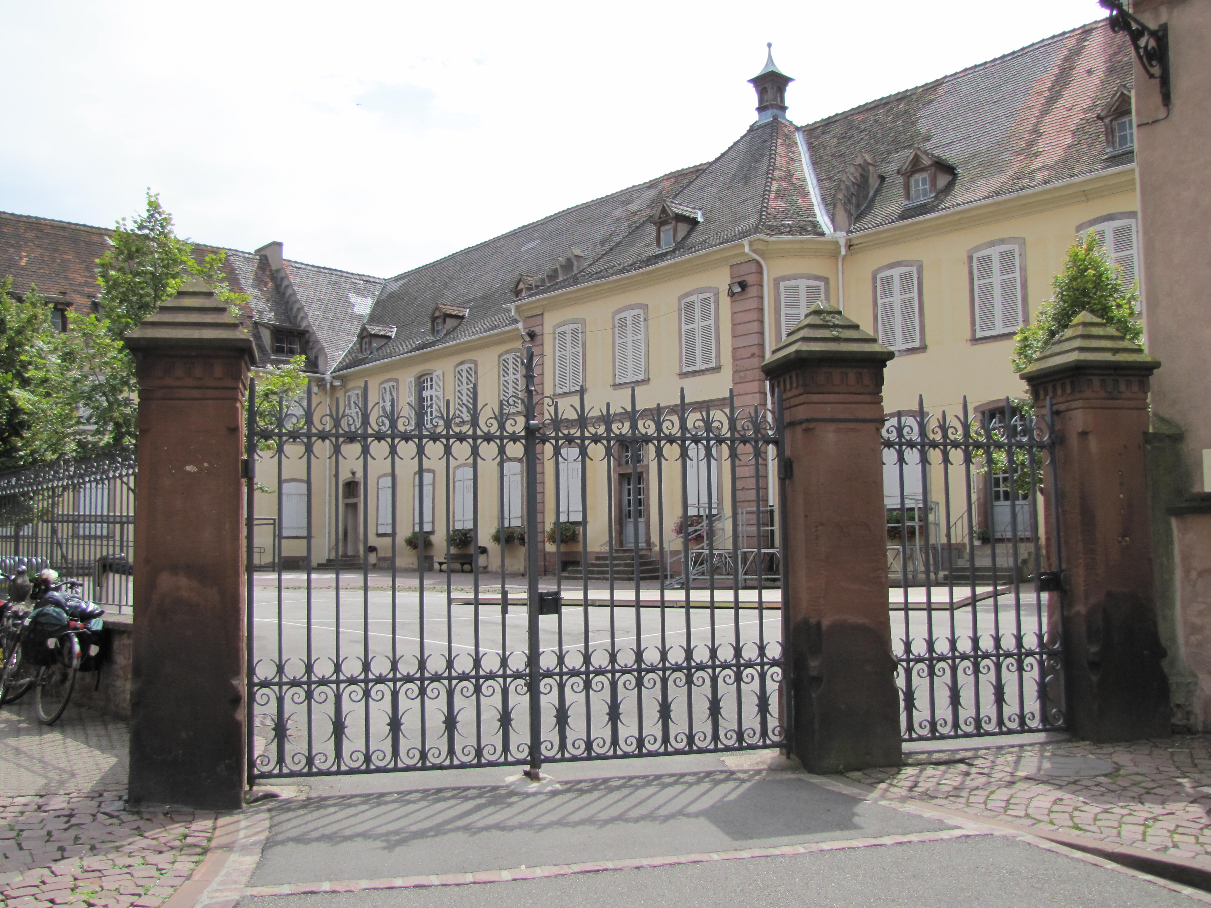 Alsace, Bas-Rhin, Sélestat, Ancien Prieuré, Ancienne école de Jésuites (XVIIIe), École Sainte-Foy, place du Marché-vert, à côté de l'église Ste-Foy (IA00124586, IA00124602).